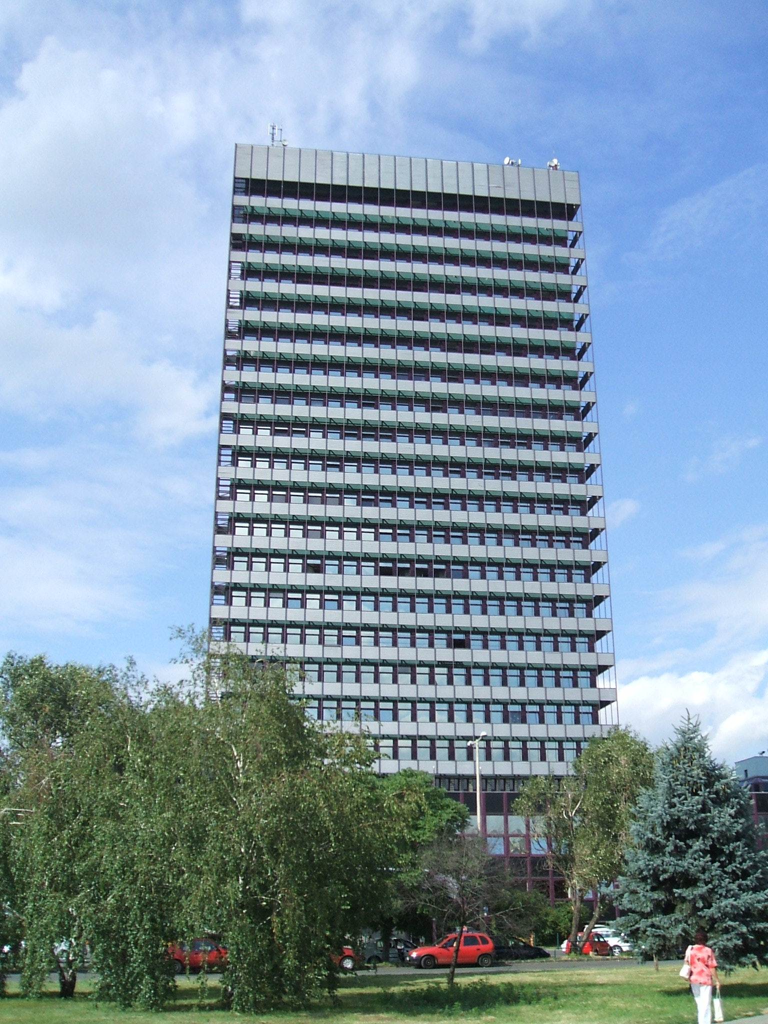 NyFI Tower (Hungarian National Pension Insurance), Budapest, Hungary